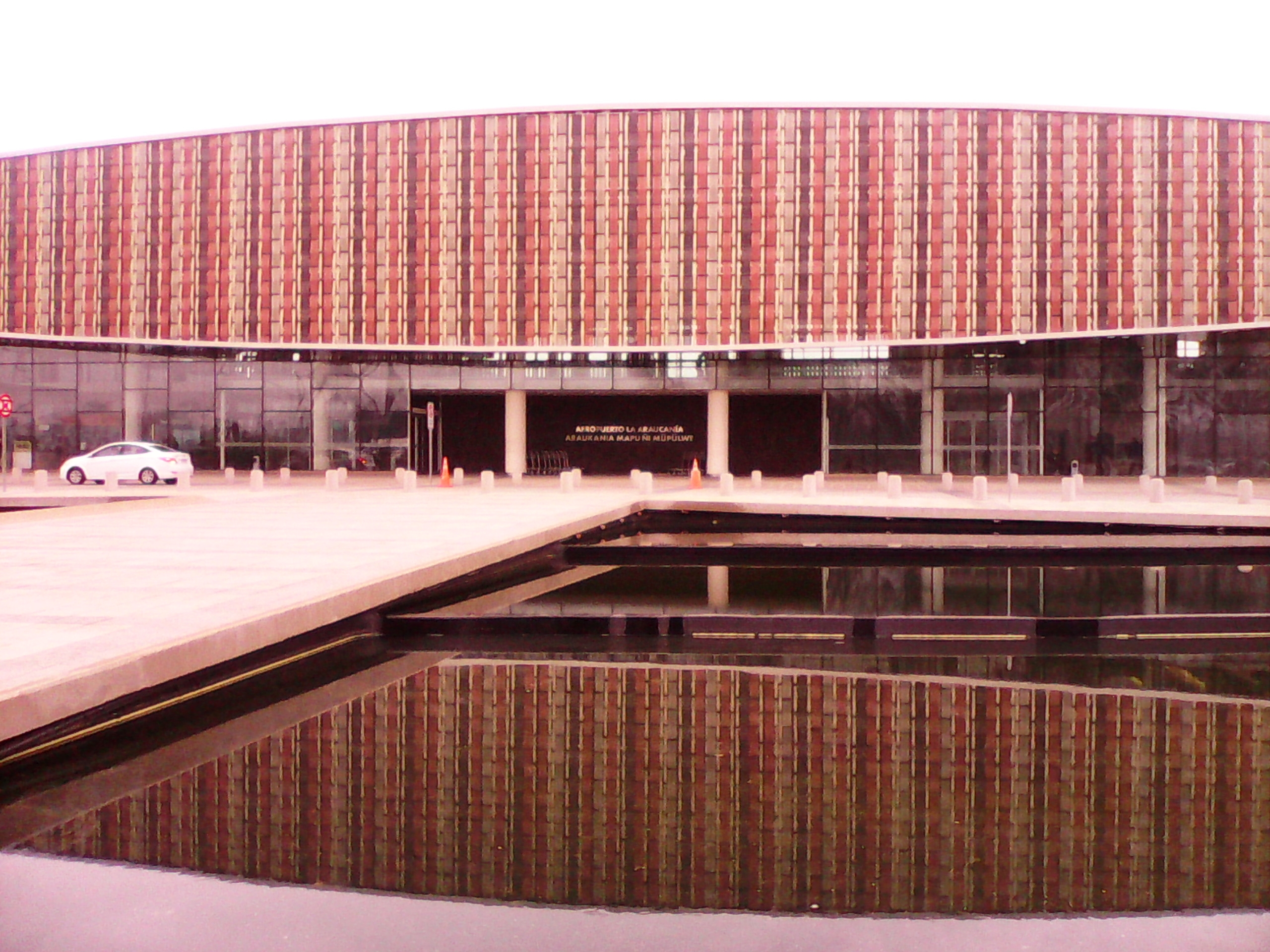 Aeropuerto La Araucanía, terminal aéreo de la Región de La Araucanía, Chile.